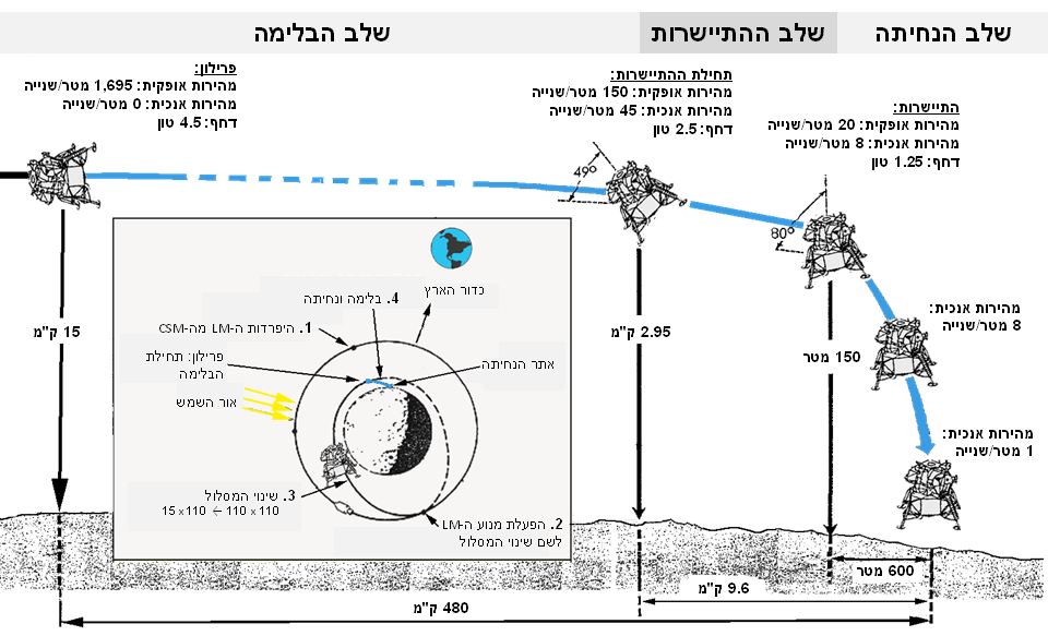 שלבי נחיתת רכב הנחיתה הירחי של תוכנית אפולו